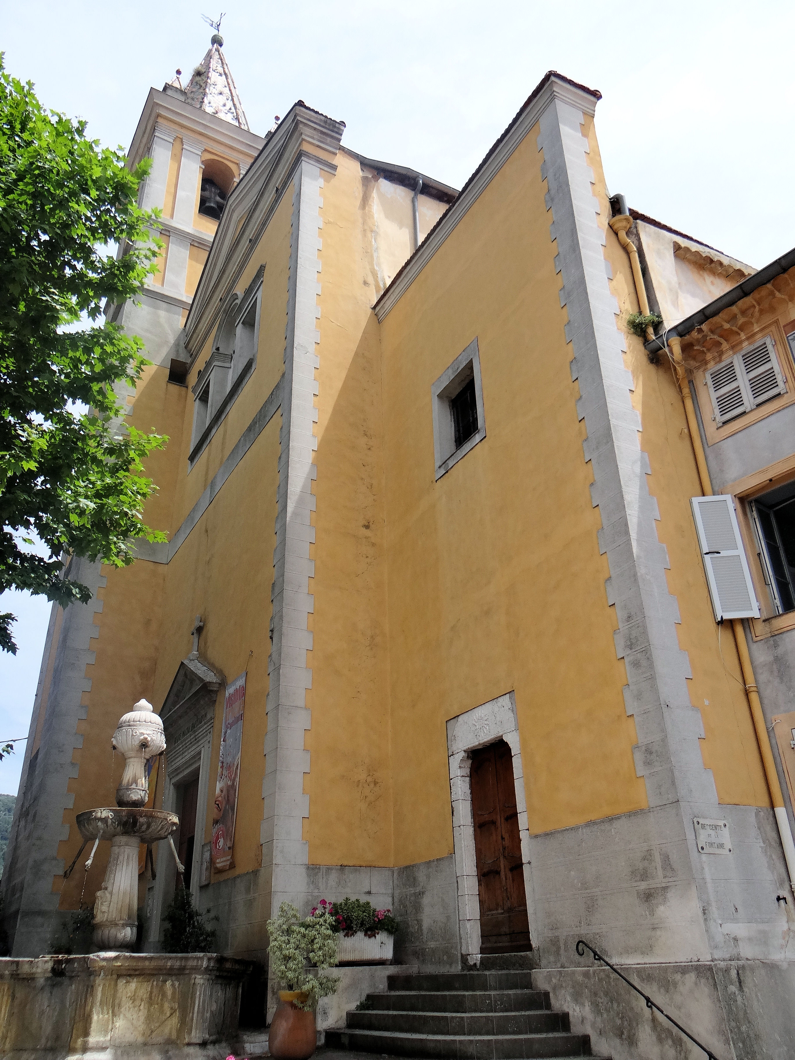 Contes (Alpes-Maritimes) - Eglise Sainte-Marie-Madeleine - Façade